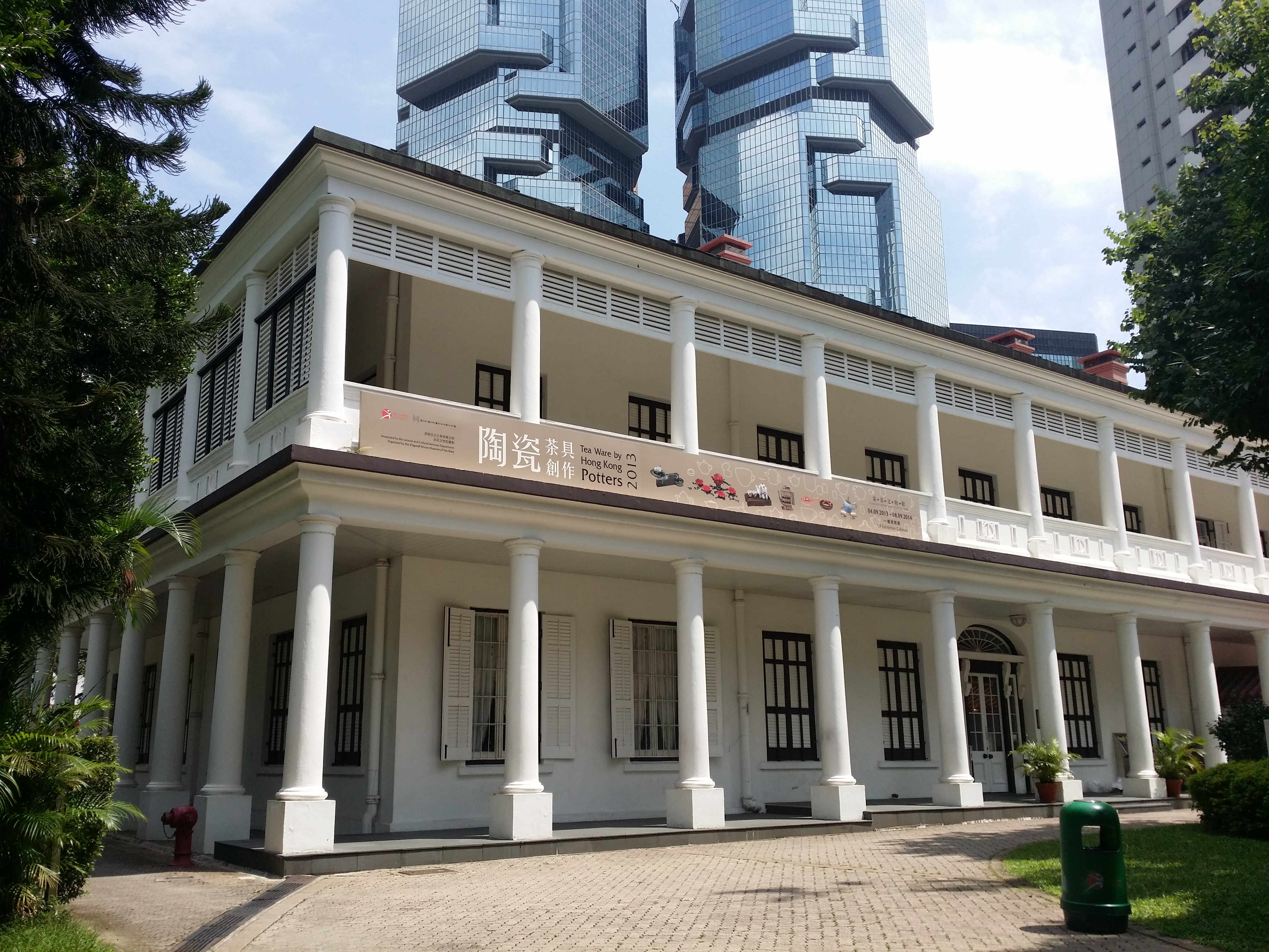 茶具文物館前身為舊三軍司令官邸